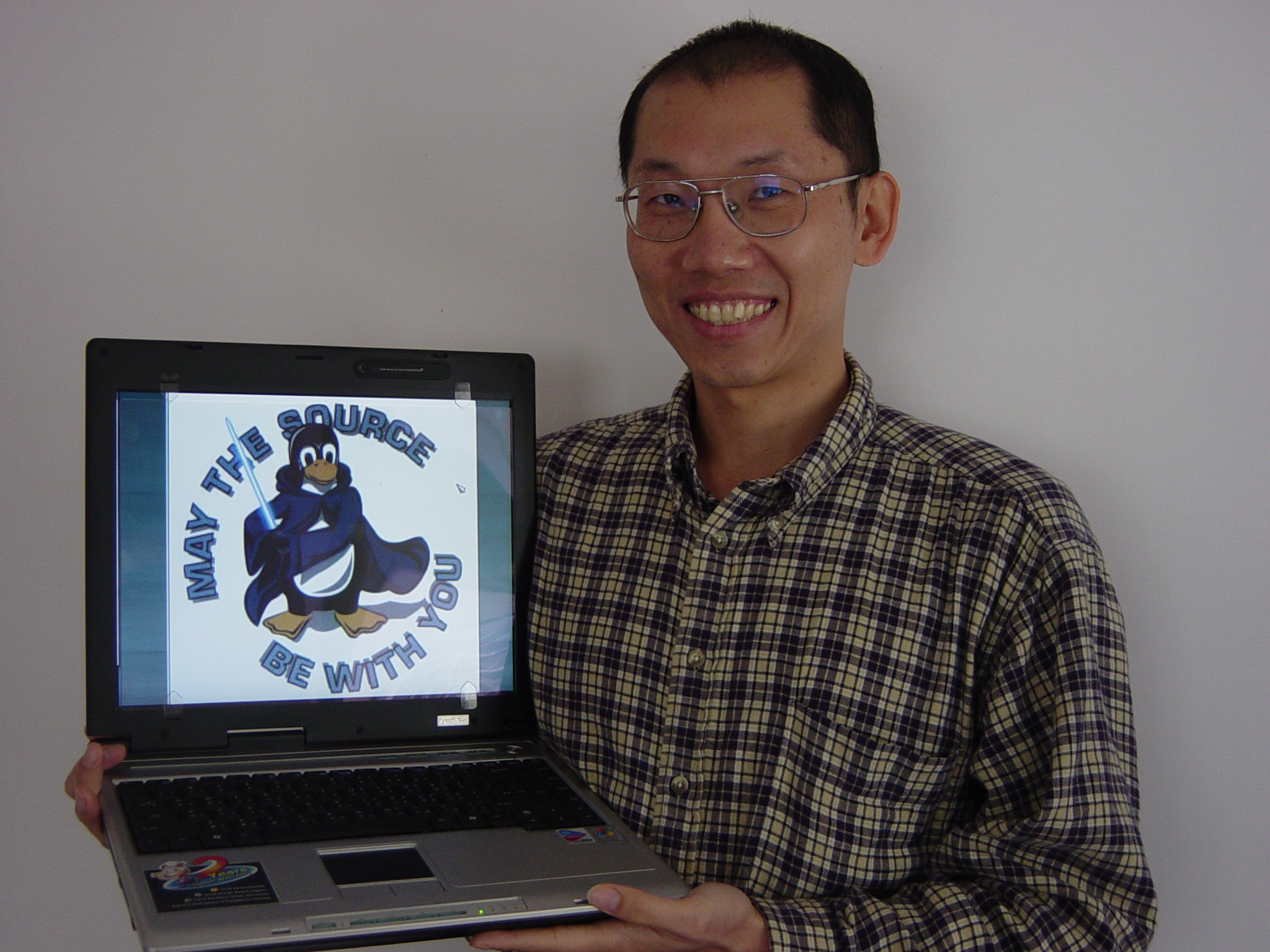 朝陽科技大學資訊管理系副教授洪朝貴（Chao-Kuei Hung）。